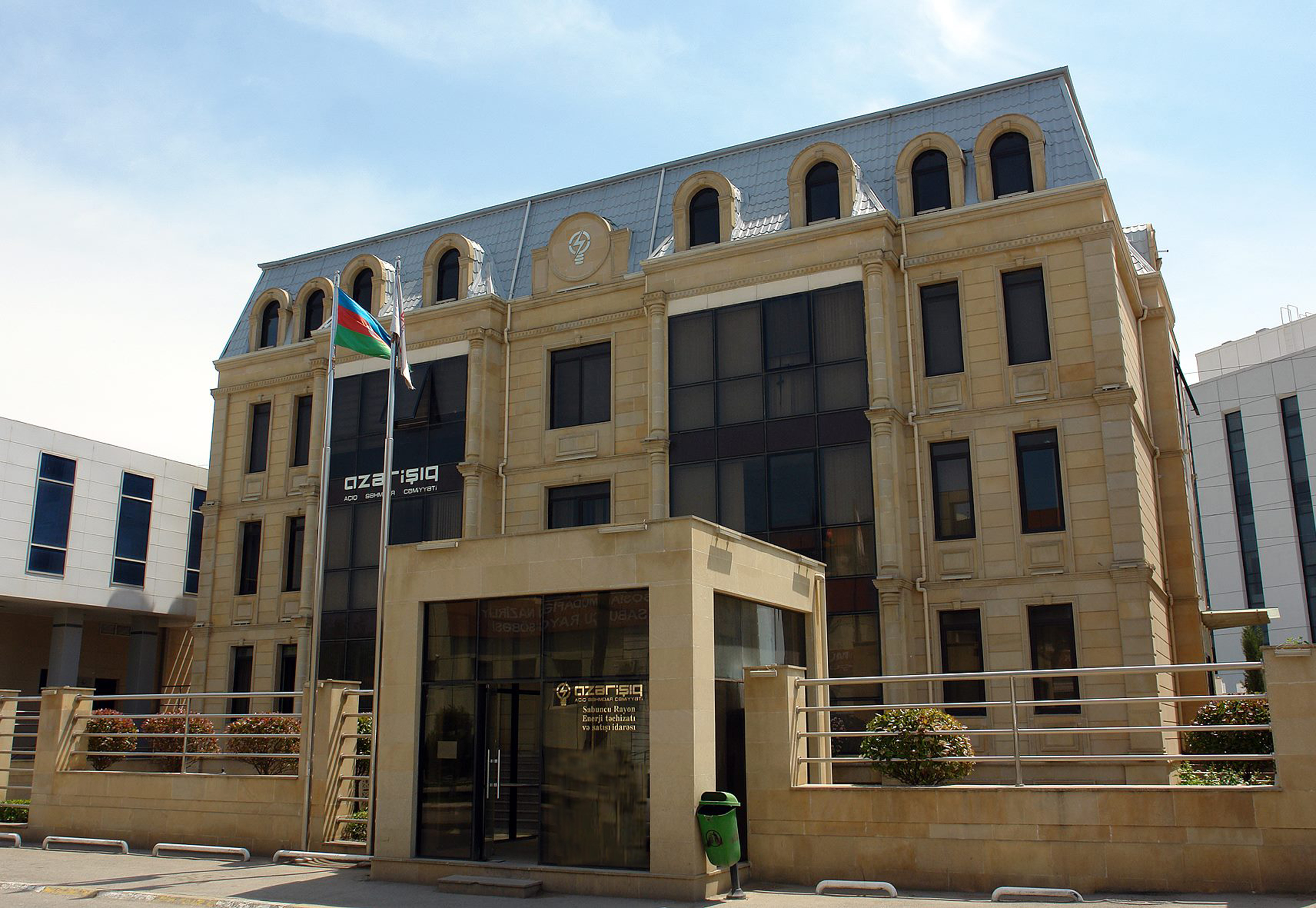 Bakıxanox (qəsəbə) Azərişıq ASC Sabunçu Rayonu Enerji Təhcizatı və satışı idarəsi